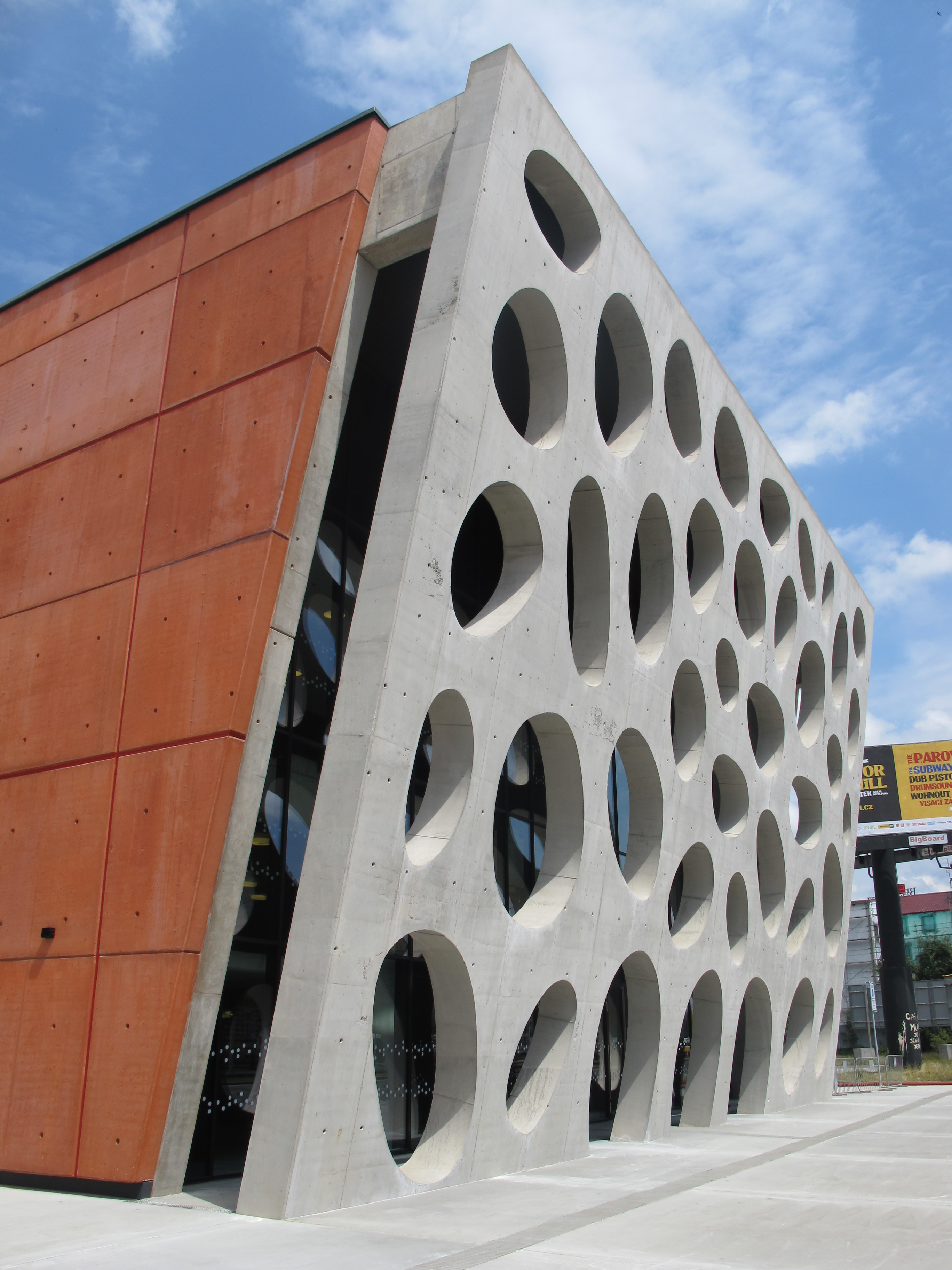 Nové divadlo v Plzni - téměř dokončené